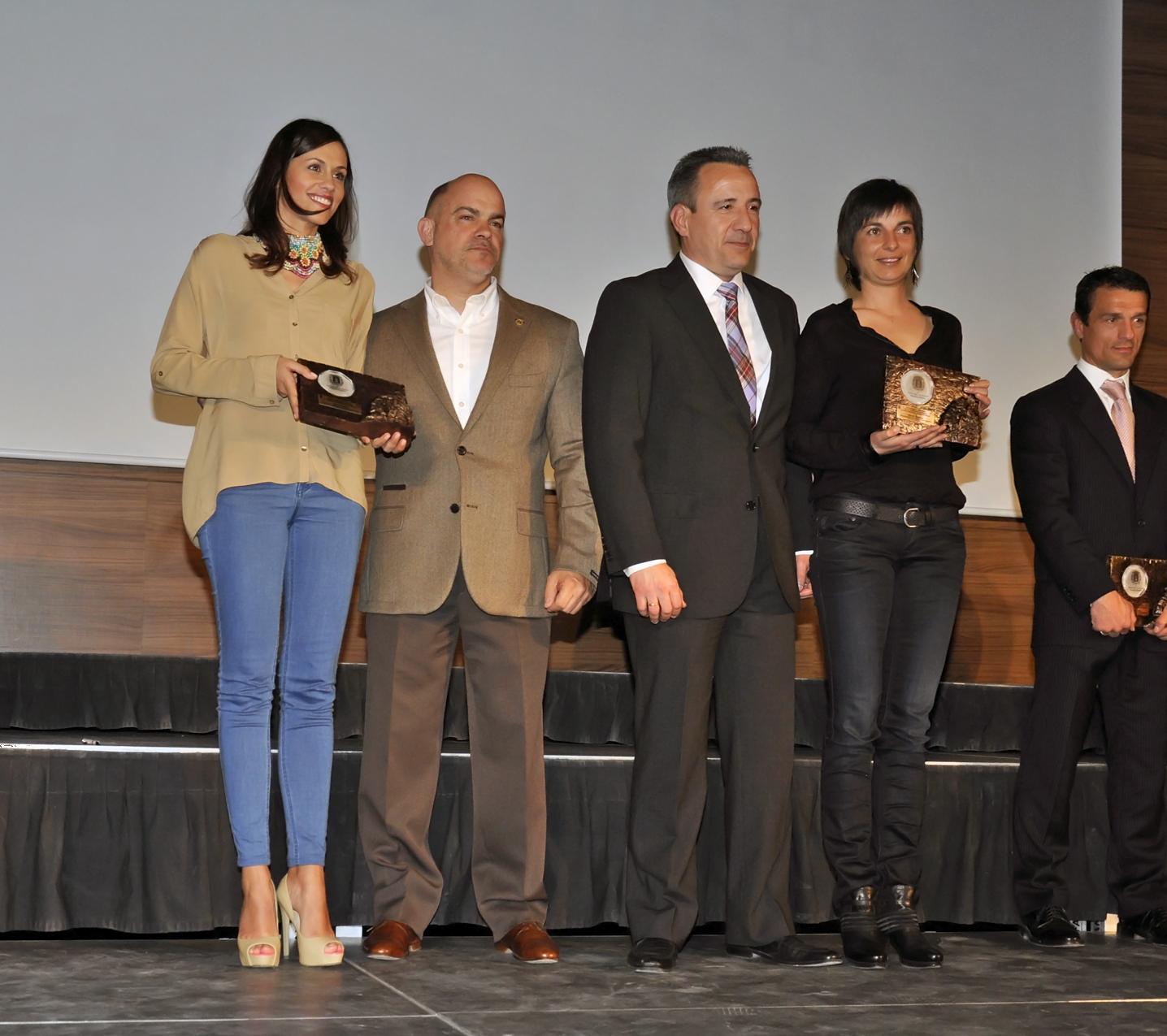 Las gimnastas rítmicas españolas Estela Giménez y Marta Baldó, recibiendo un trofeo conmemorativo en la Gala del XXV Trofeo Ayuntamiento de Alicante celebrada el 28 de febrero de 2014.